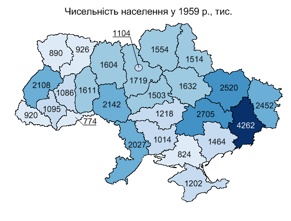 Населення регіонів Української РСР у 1959 р., тис. / Population of ukrainian regions in 1959